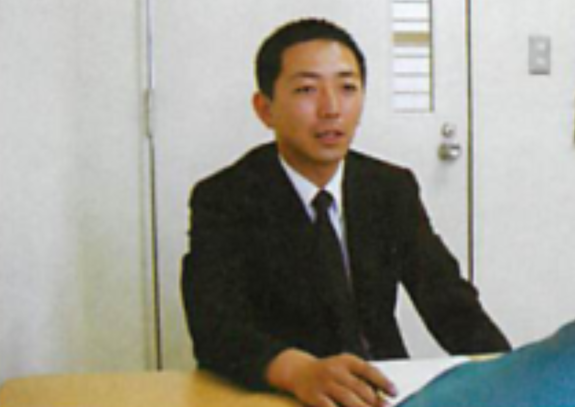 少年鑑別所での処遇調査